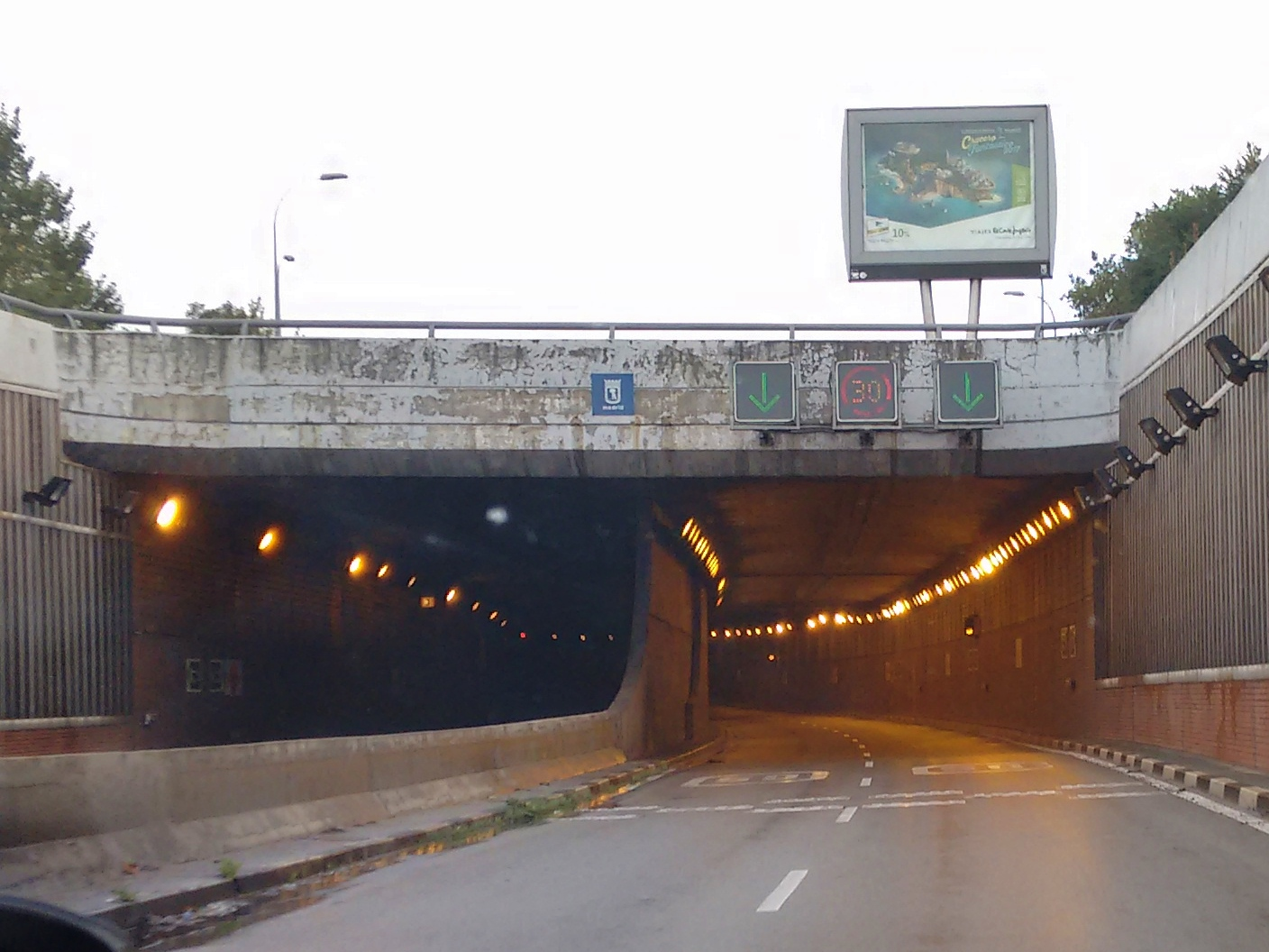 Entrada noroeste al túnel de Sor Ángela de la Cruz, Madrid.